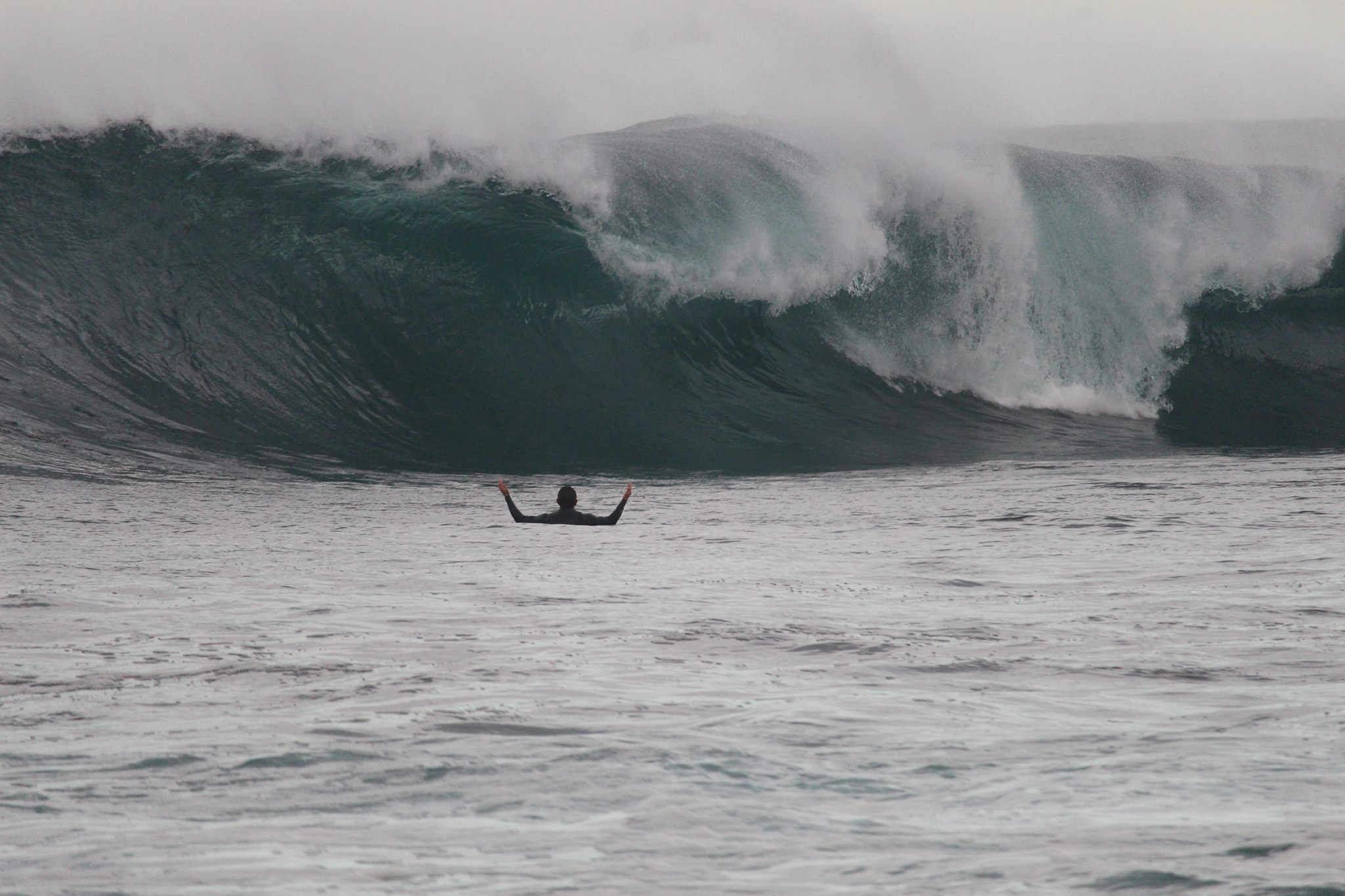 Guillermo Carracedo enfrentadose a una ola en alguna aventura por el mundo.